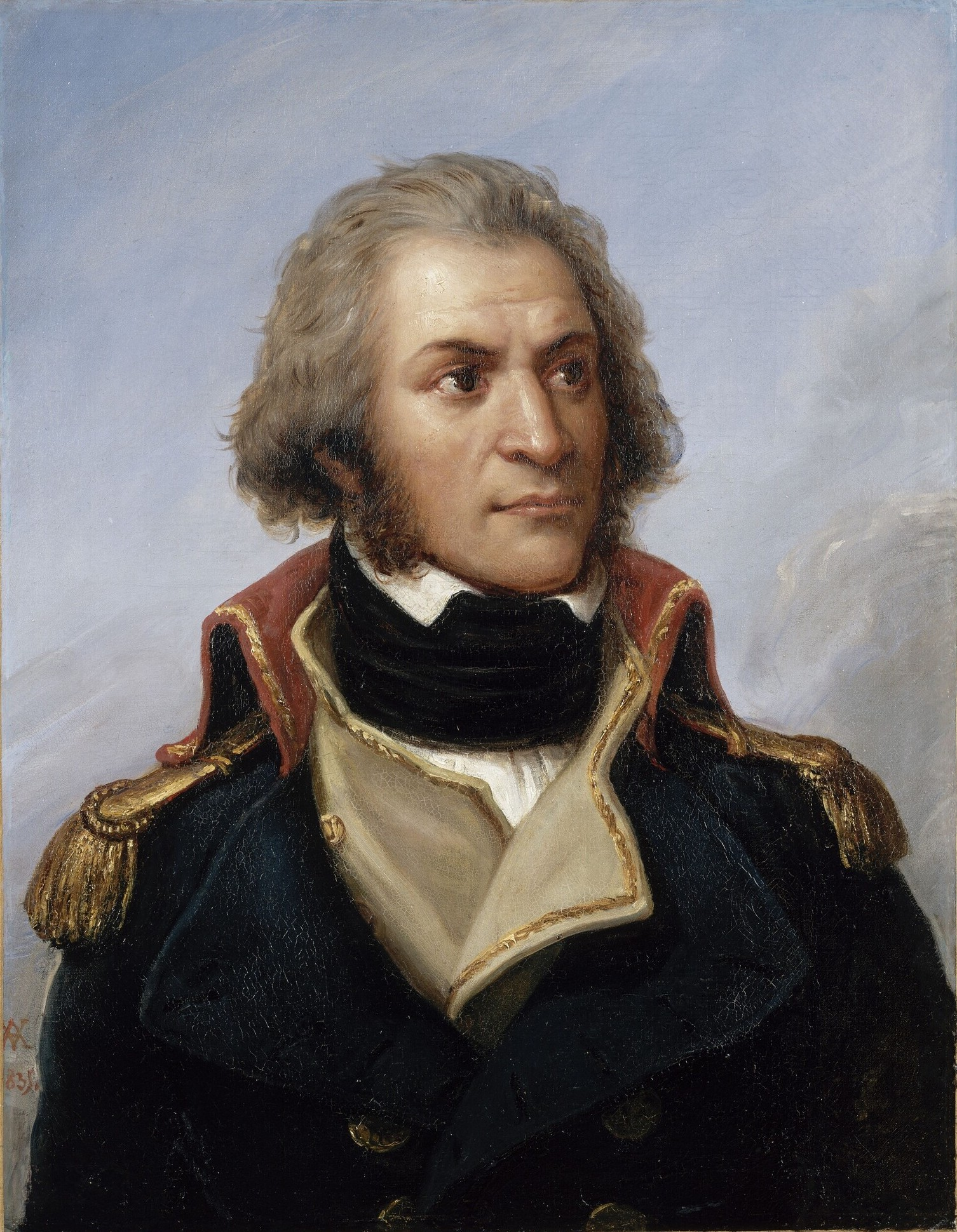 Commandé par Louis-Philippe pour le musée historique de Versailles en 1835